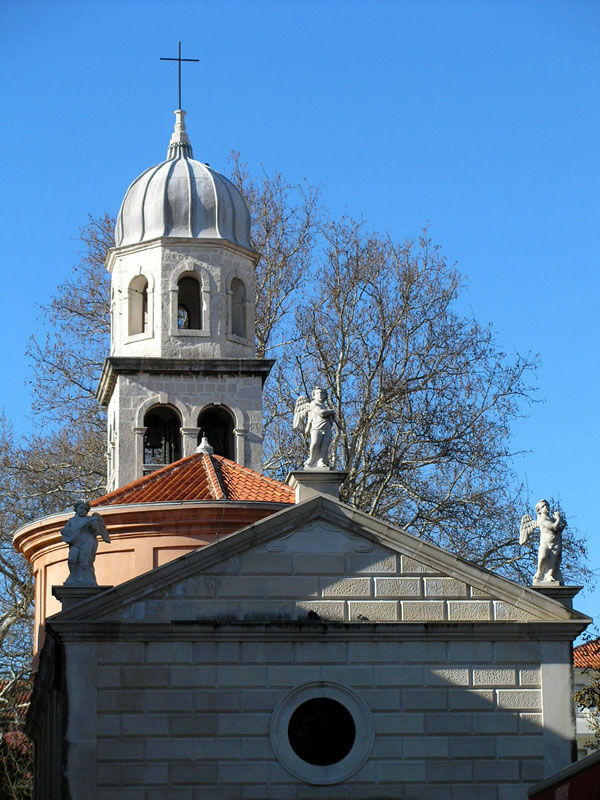 Zadar